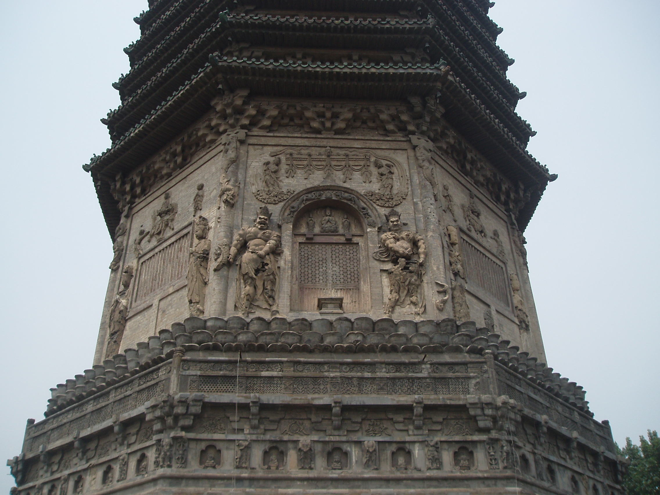 Tianning Temple Pagoda in Beijing